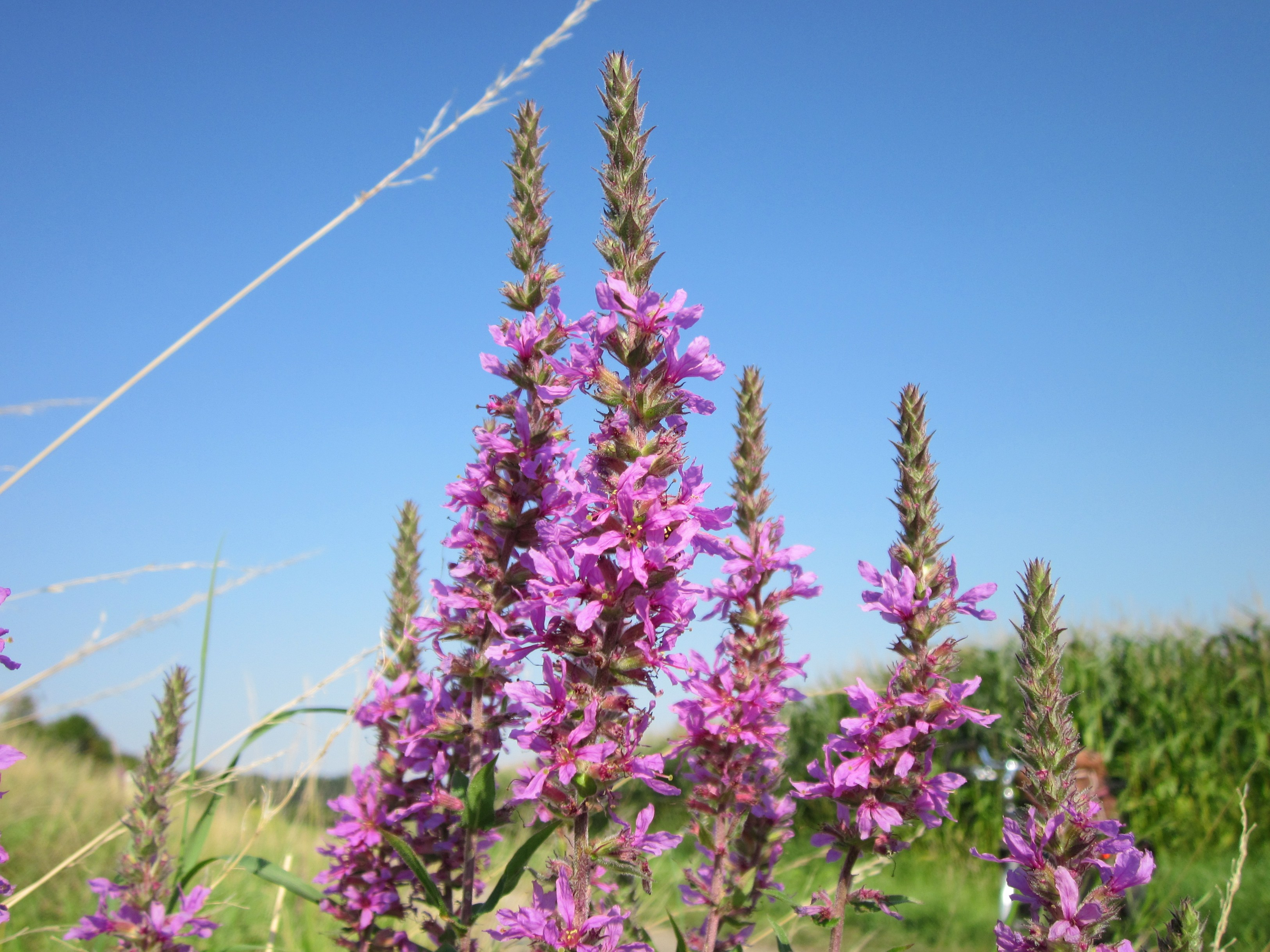 Blutweiderich (Lythrum salicaria) bei Reilingen